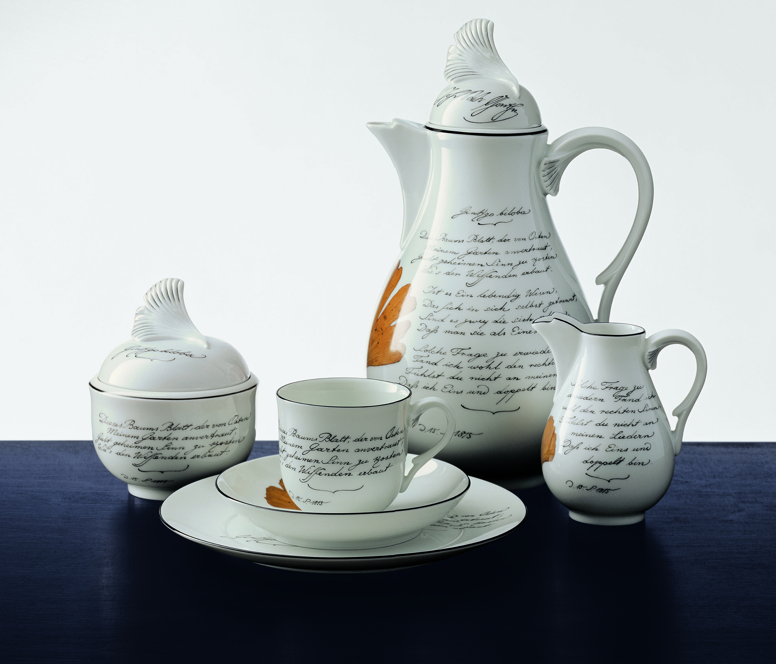 Schlossmanufaktur Ludwigsburg GmbH, Das Kaffeeservice Ginkgo biloba auf Ludwigsburger Porzellan